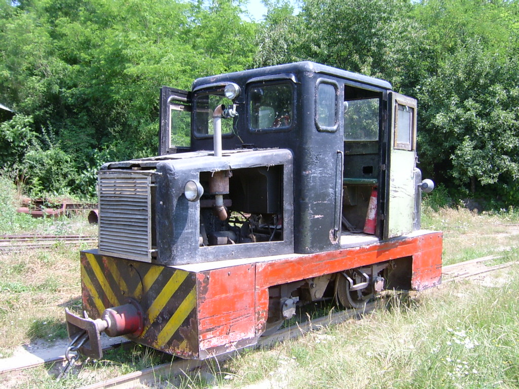 C-50-es Felsőpetényben